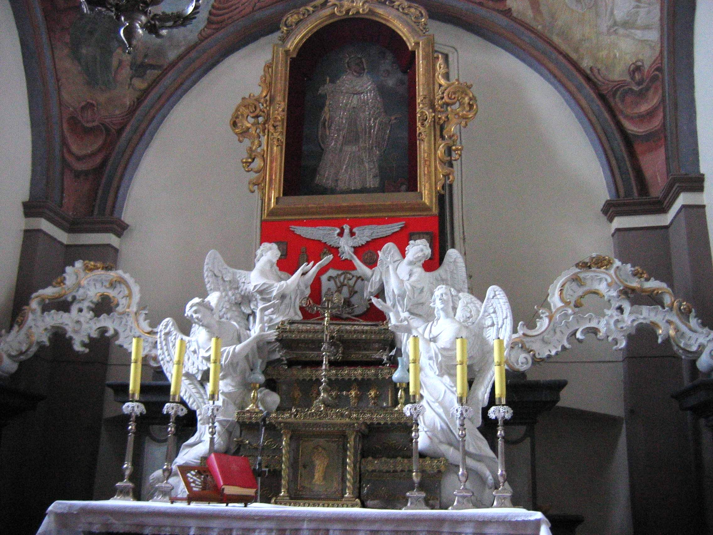 The relics of master Wincenty Kadłubek in Jędrzejów monastery. author Maciej Szczepańczyk-user:Mathiasrex